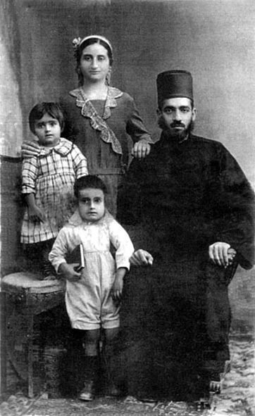 הרב יעקב קצין עם אשתו מזל טוב, בתו שרלוט ובנו שאול